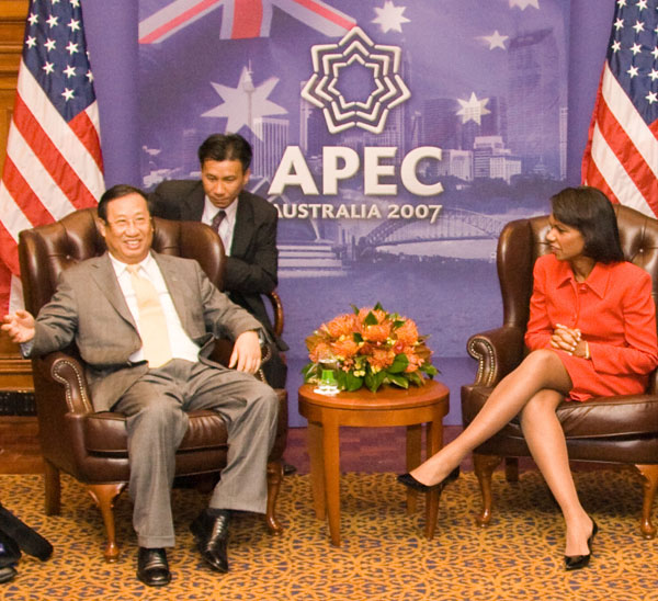 Pham Gia Khiem and Condoleezza Rice.